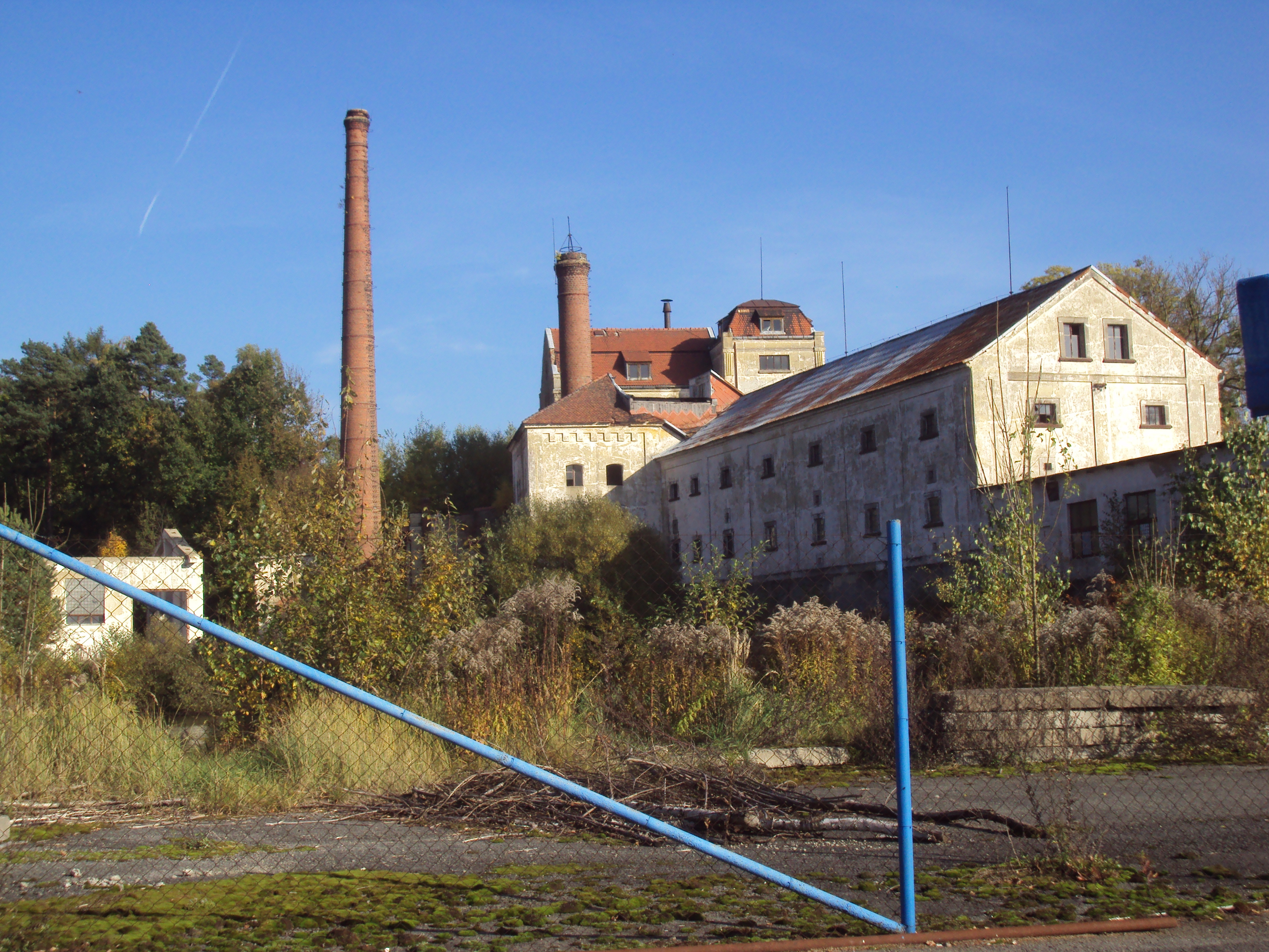 Zrušený cvikovský pivovar, Cvikov II, Pivovarská ulice 405, foceno z ulice Březová